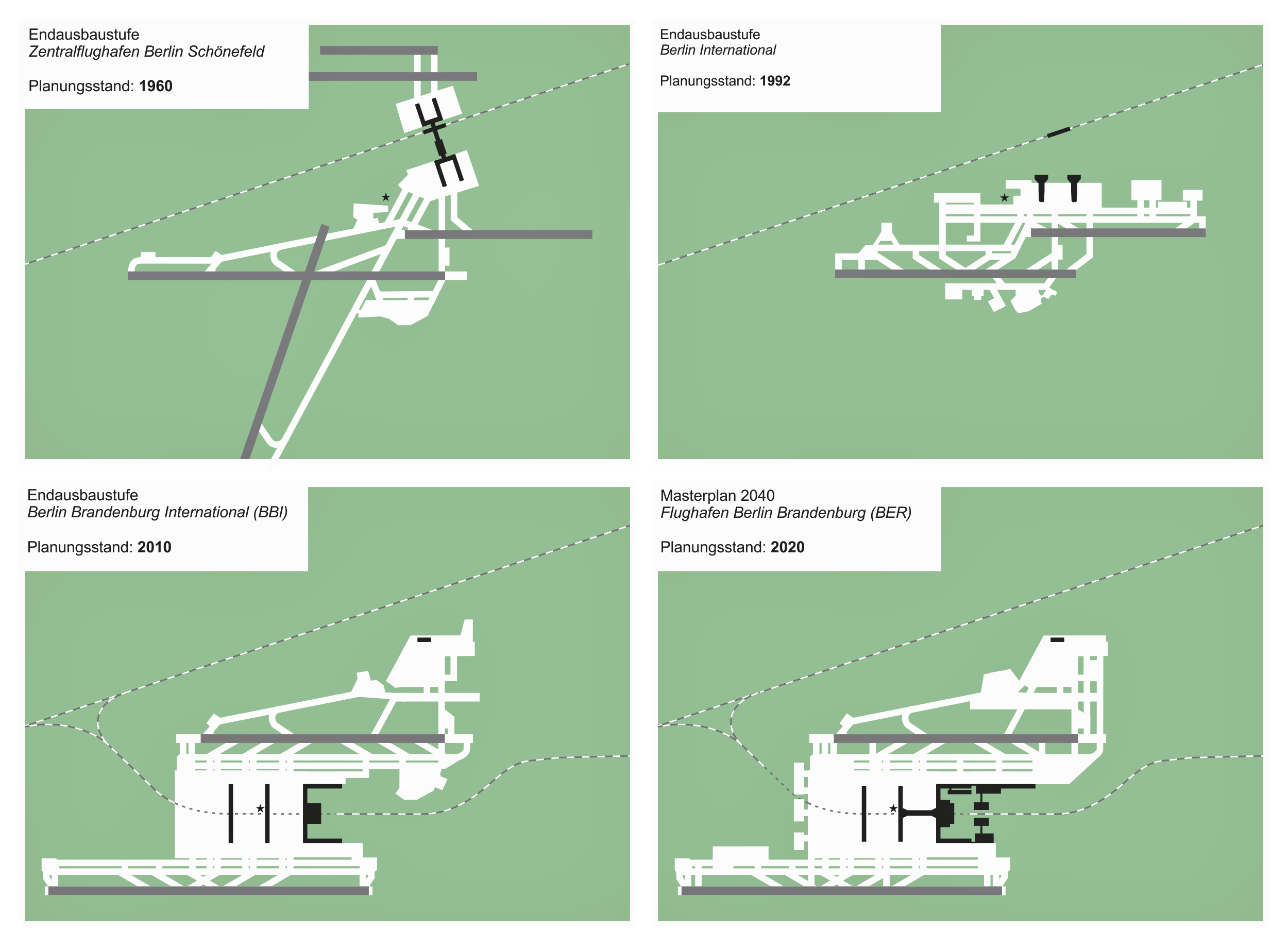 Ausbaupläne Flughafen Schönefeld (Berlin-Brandenburg) im Vergleich